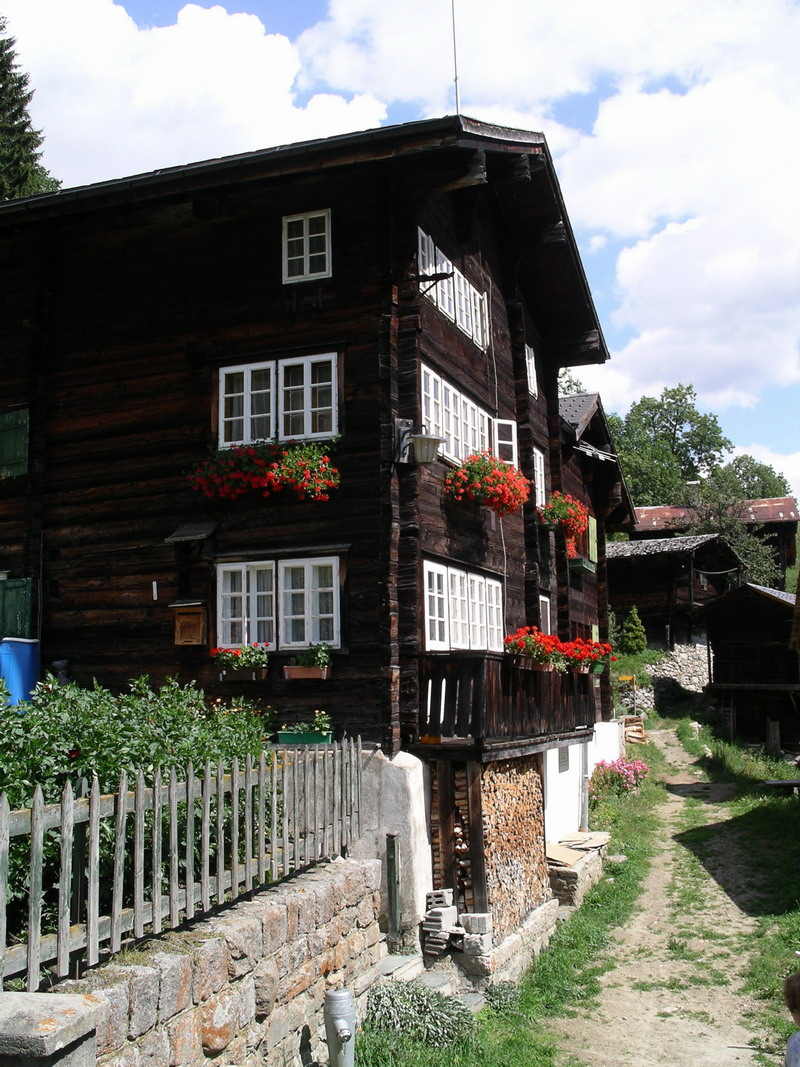 Beschreibung: Geburtshaus von Cäsar Ritz Quelle: selbst fotografiert Fotograf: Egon Schmidt (für die GNU FDL)